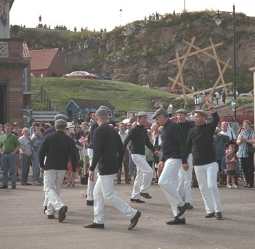 Flamborough Schwerttänzer / Beschreibung: Die Flamborough Schwerttänzer beim 2. International Sword Spectacular, Whitby, England, Mai 1998